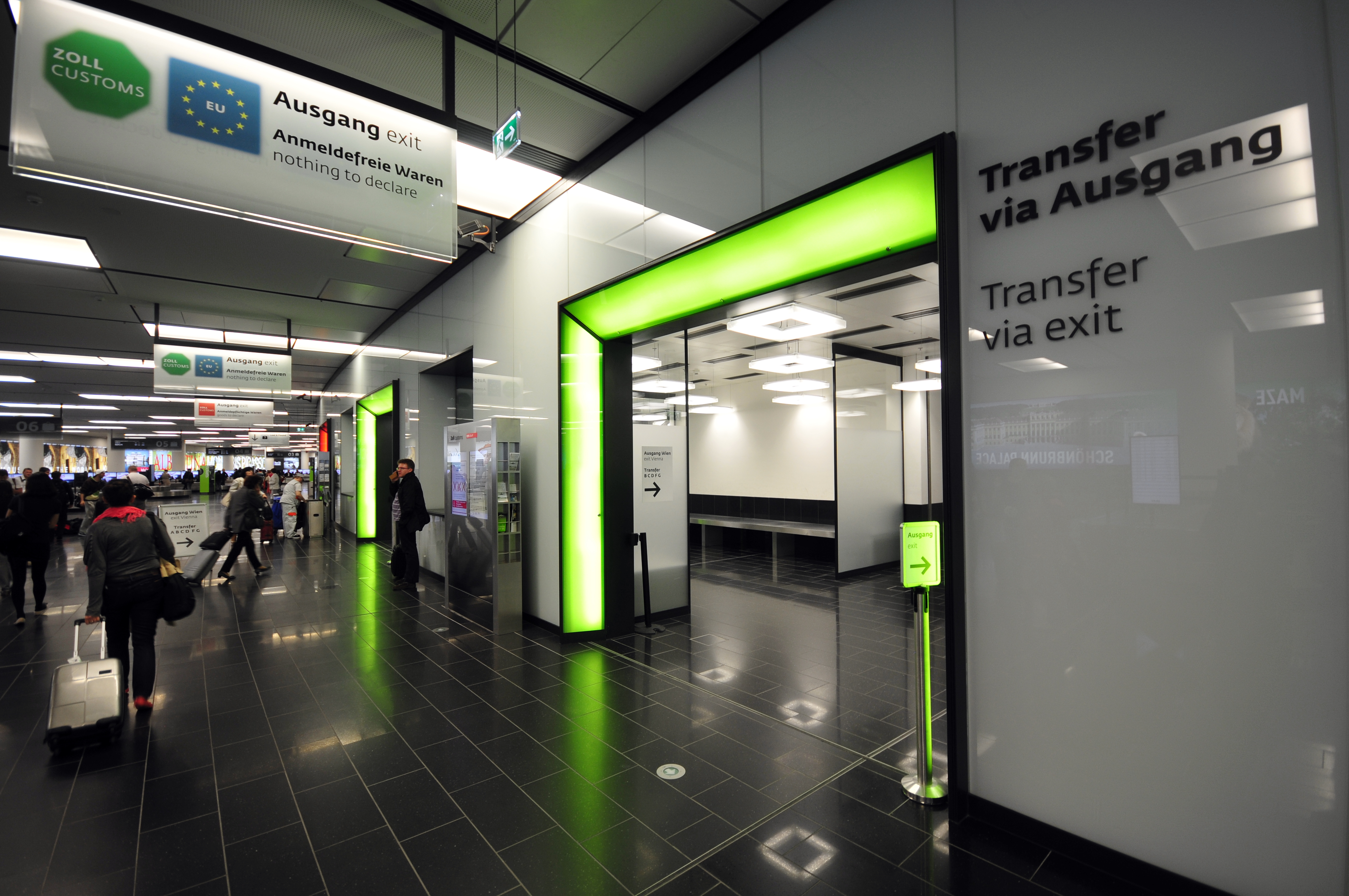 Landeanflug Wien-Schwechat